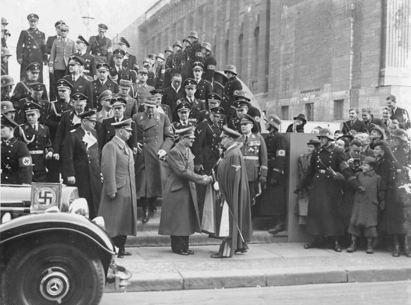 Berlin, Pergamon Museum, Ausstellungsbesuch Hitler Der Führer bei der Eröffnung der "Japanischen Kunstausstellung" im Deutschen Museum. Der Führer verabschiedet sich nach der Eröffnung der Ausstellung vor der zum Pergamon Museum führenden Brücke von Gen.Feldmarschall Göring. In der Umgebung des Führers sehen wir Reichsfüher der SS Himmler, Chef-Adjudant Brückner, Staatsminister Dr. Meissner, Staatssekretär Körner, Gen.Major Bodenschatz und der Reichsminister v. Ribbentrop und Rust. Phot. Ho. 28.2.39 2749-39 Abgebildete Personen: Hitler, Adolf: Reichskanzler, Deutschland Brückner, Wilhelm: SA-Obergruppenführer, Chefadjutant Hitlers, Deutschland Bodenschatz, Karl: Generalmajor, Luftwaffe, persönlicher Adjutant Görings, Deutschland (GND 12430205X) Ribbentrop, Joachim von: Außenminister, NSDAP, Deutschland Rust, Bernhard: Minister für Wissenschaft, Erziehung und Volksbildung, Gauleiter, Deutschland (GND 119368617) Göring, Hermann: Reichsmarschall, Oberbefehlshaber der Luftwaffe, Ministerpräsident von Preußen, Deutschland